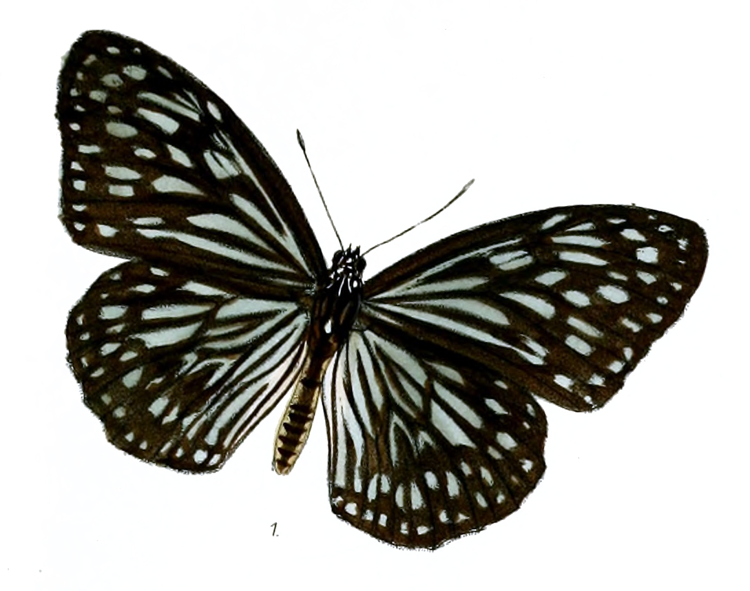 Tirumala gautama